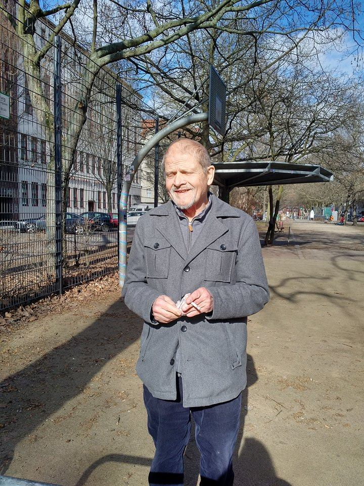 Porträt